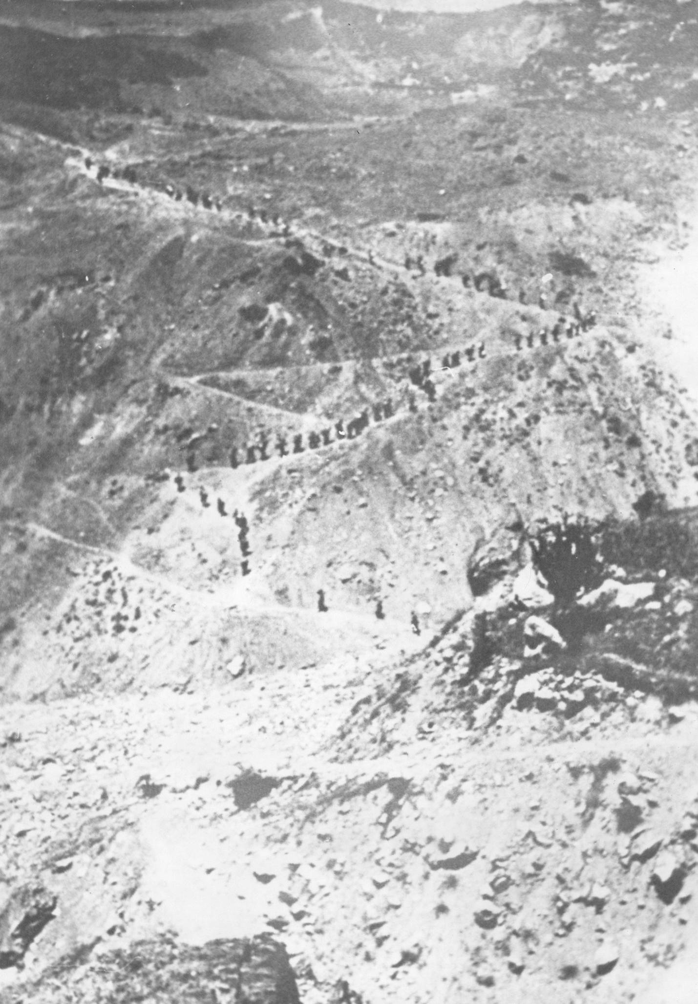 Srpskohrvatski / српскохрватски: Prva makedonsko-kosovska brigada u februarskom pohodu 1944.